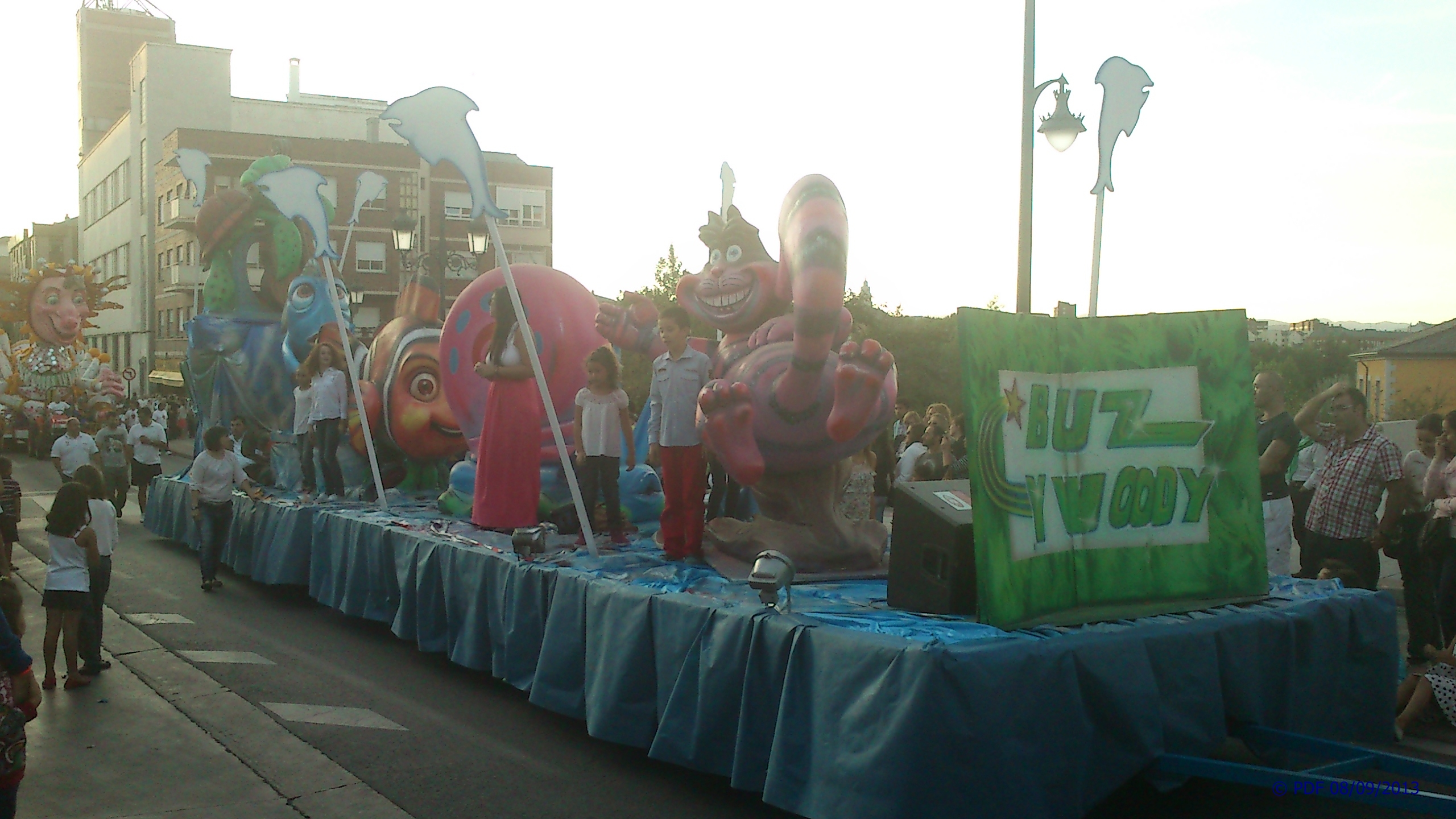 Carrozas de las fiestas de La Encina 2013. Ponferrada, León, España